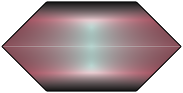 mira zkresleni